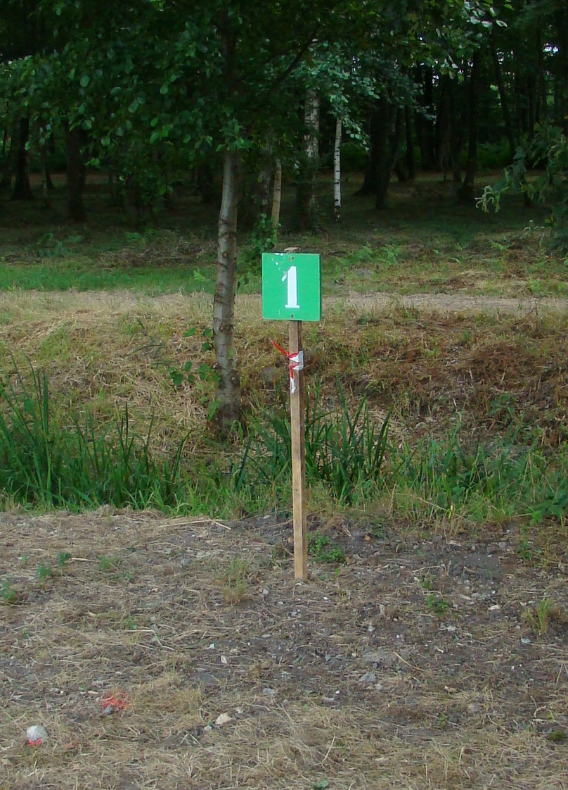 picture taken at 2008 generali opn de france 2008